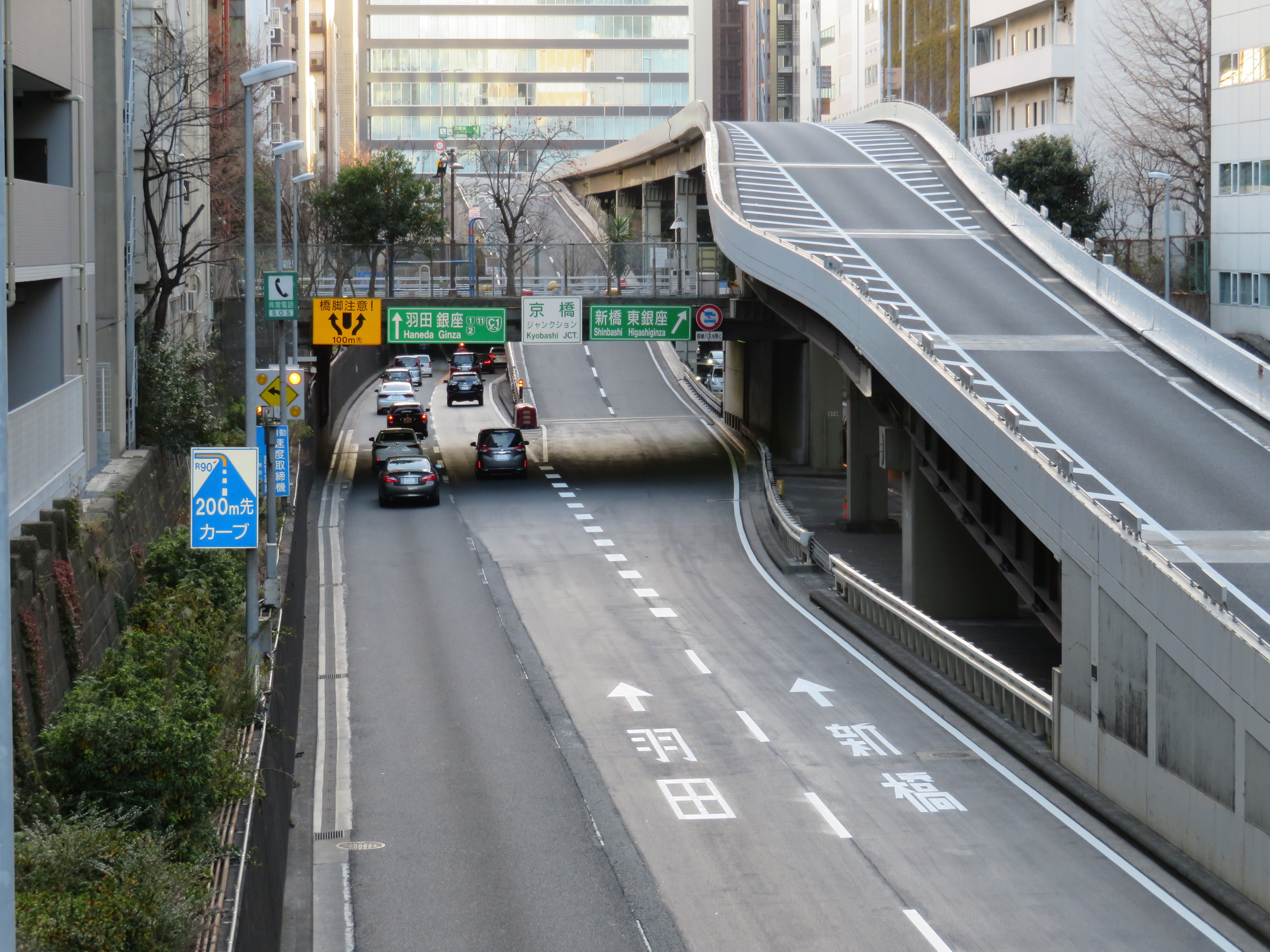 首都高速道路都心環状線京橋JCT（外回り分岐付近）